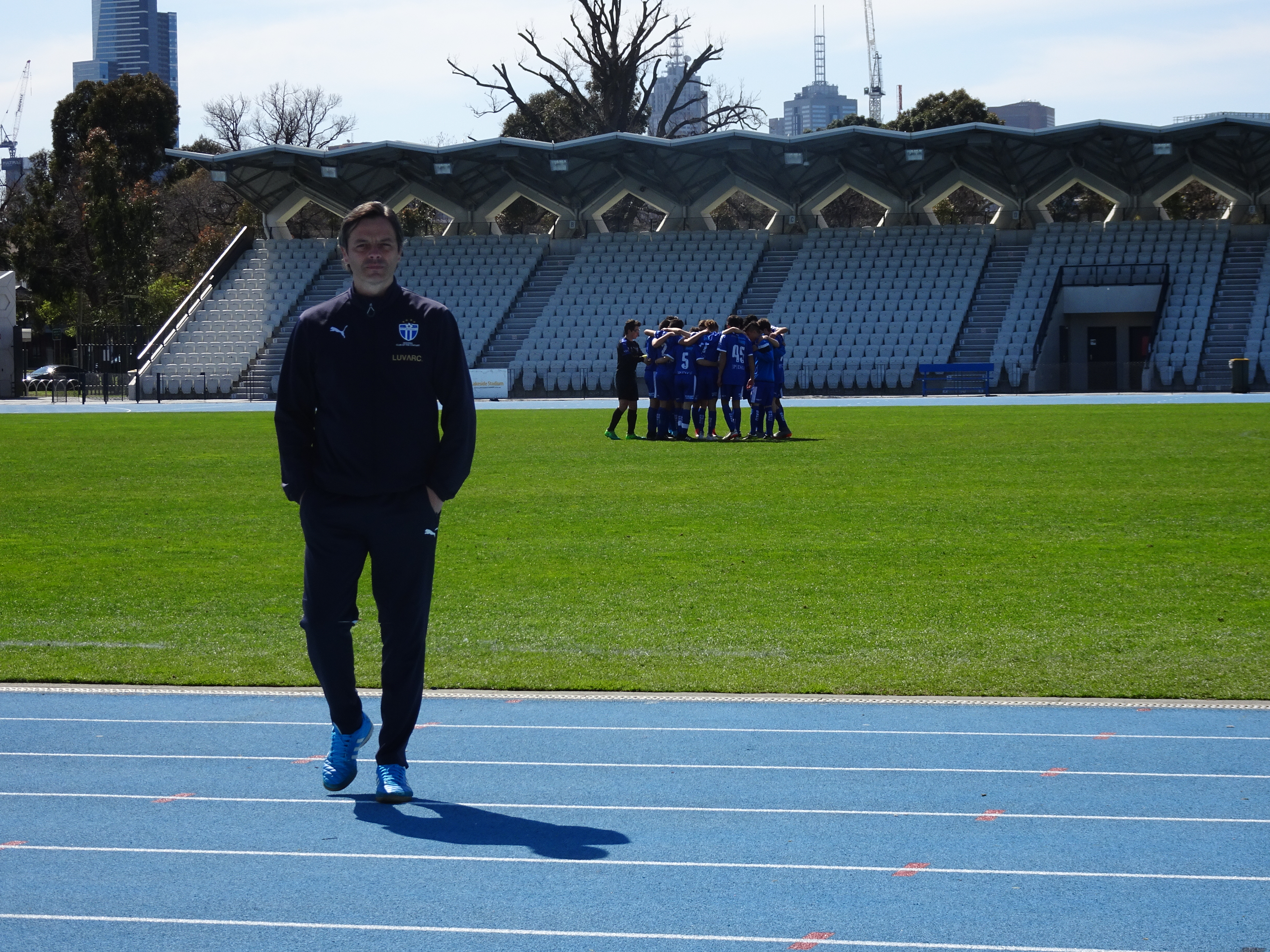 Владимир Белић у опреми ФК Јужни Мелбурн током утакмице